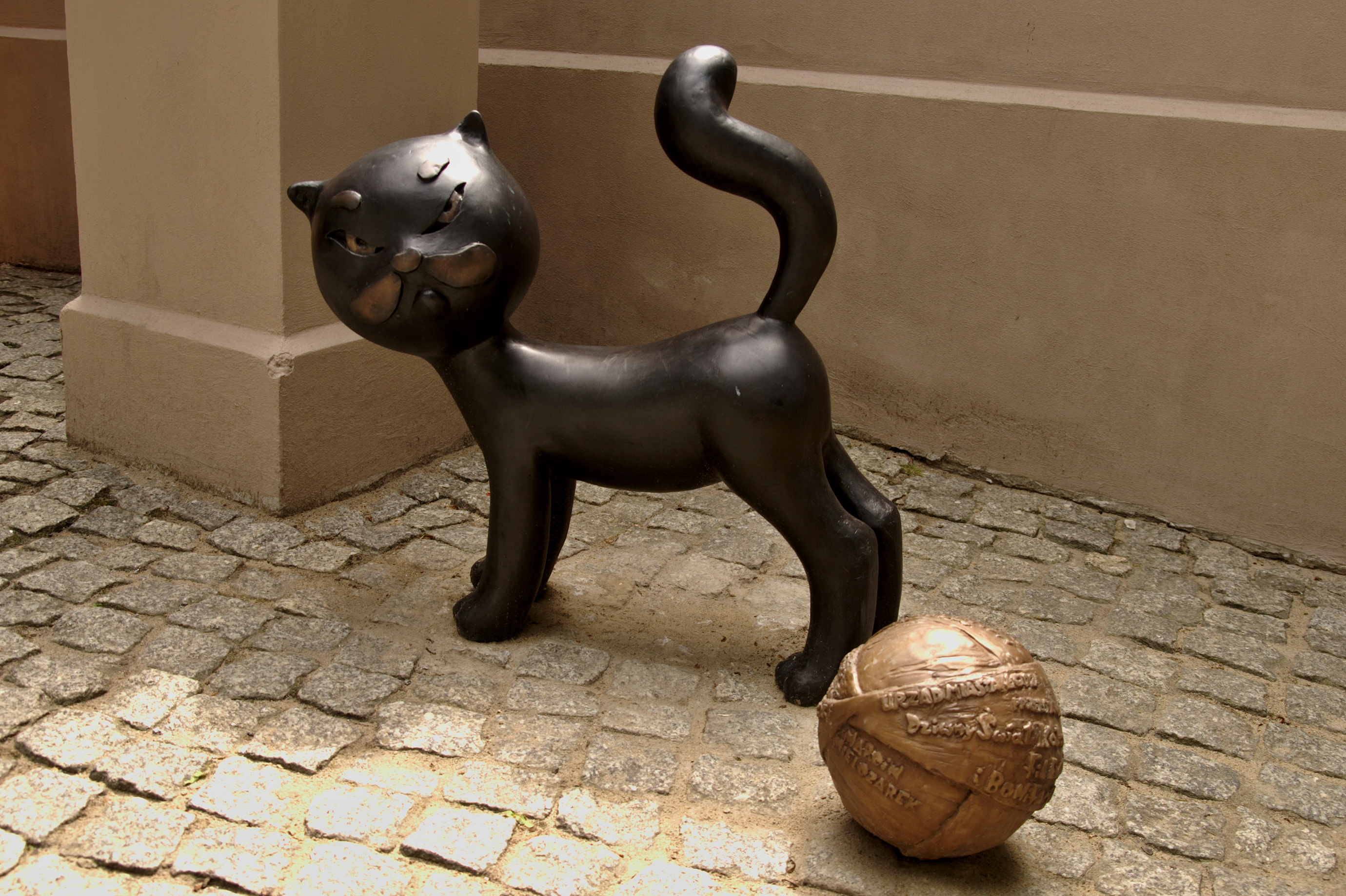 Kot Bonifacy, rzeźba autorstwa Magdaleny Walczak i Marcina Mielczarka, Bajkowa Łódź, Muzeum Kinematografii, Łódź